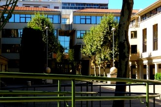 Bâtiment CPGE (5 étages ; 1 amphithéâtre).